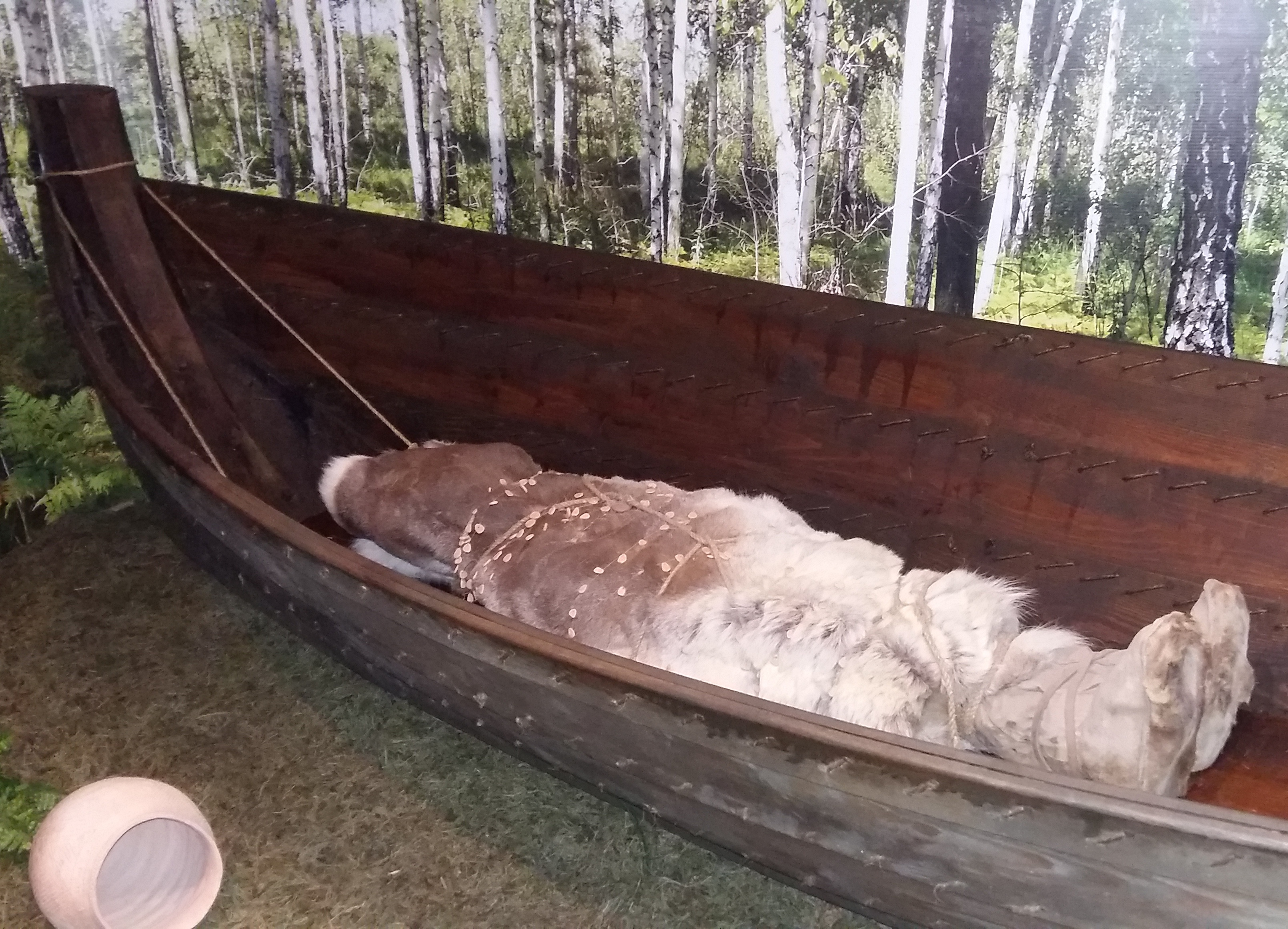 Точная копия погребальной ладьи медного века (3190 год до н. э. ± 60 лет), обнаруженной в 1996 году в могильнике «Бузан-III» в Ингальской долине. Длина более 5 м, является древнейшей из числа найденных в Северной Евразии. Копия выполнена сотрудником Тюменского областного музейного комплекса Ришатом Рахимовым, хранится в подземной галерее Ялуторовского острога.